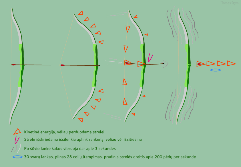 Lankų veikimo principas (šiuo atvėju lenktojo).